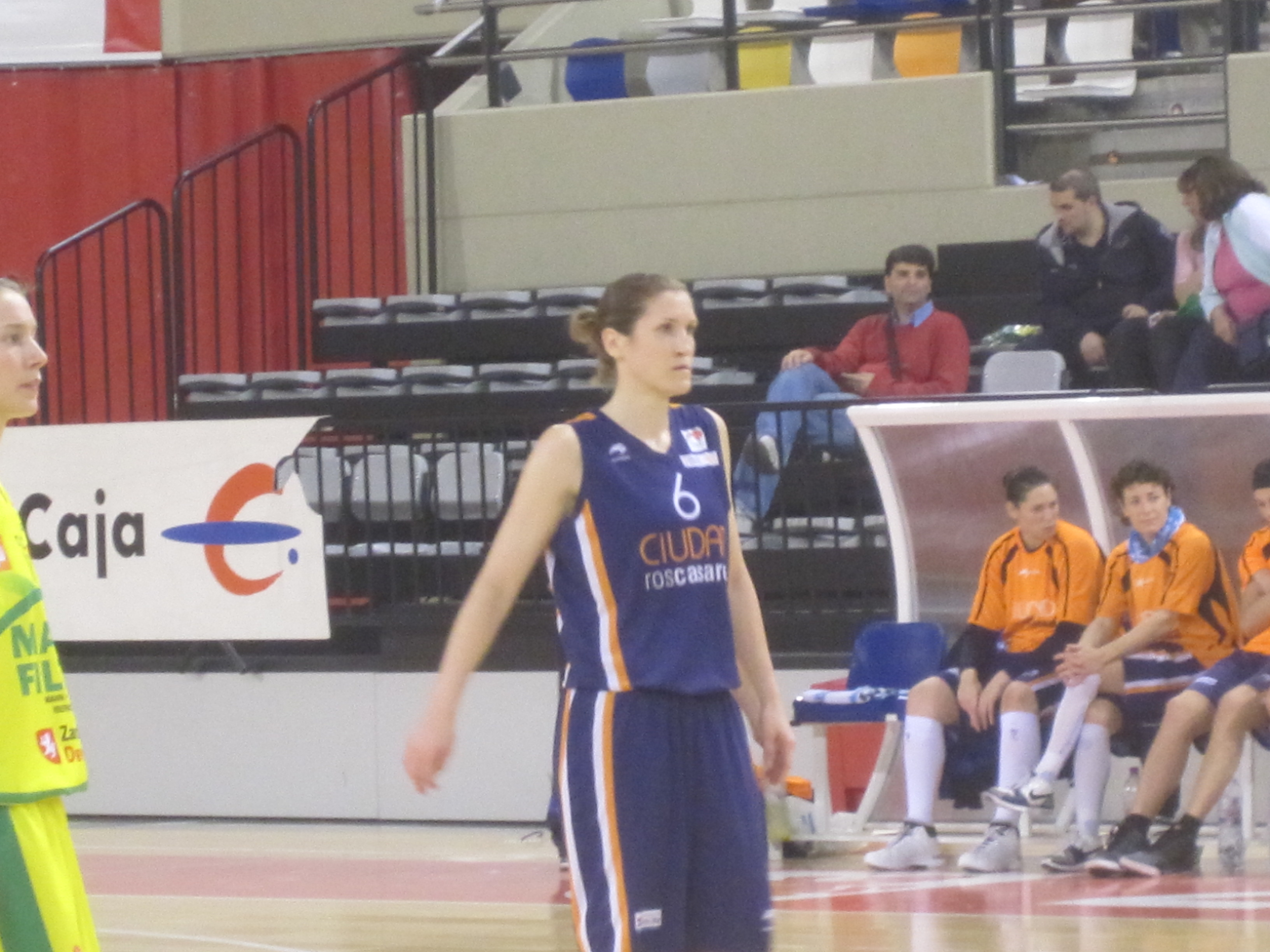 La Jugadora Australiana de Baloncesto Belinda Snell.